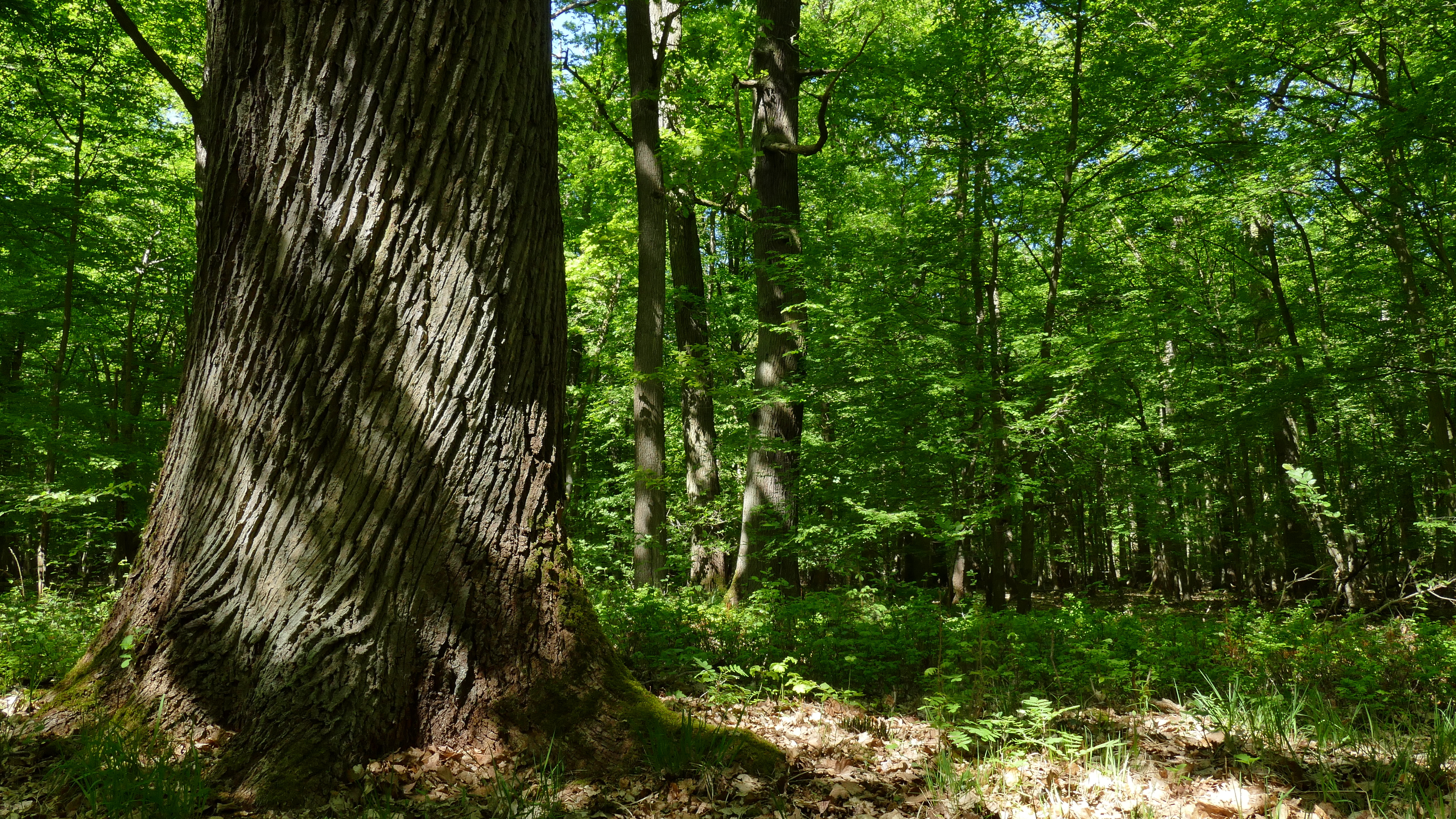 Im Naturschutzgebiet Kananohe (NSG-HA195) wird ein historisch alter Waldstandort mit unterschiedlichen Waldtypen auf sauren Böden geschützt. Dabei ist die reiche Altersstruktur besonders schützenswert.